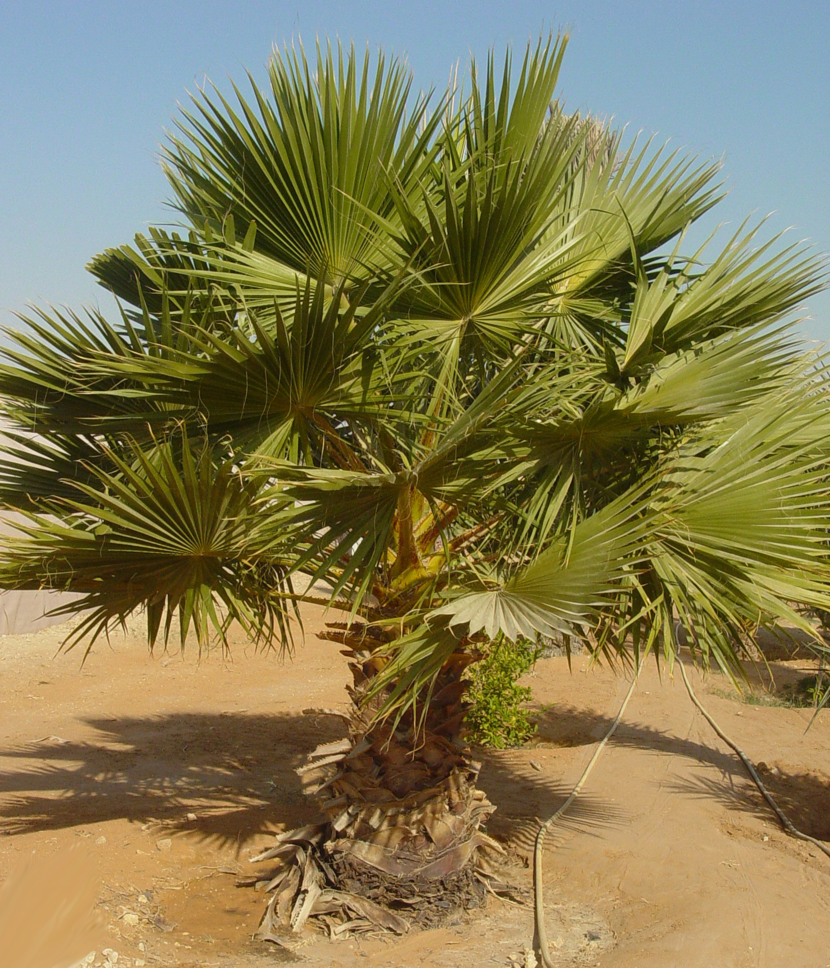 കുടപ്പന എന്ന ലേഖനത്തിനു വേണ്ടി .......